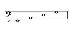 portée accord contrebasse